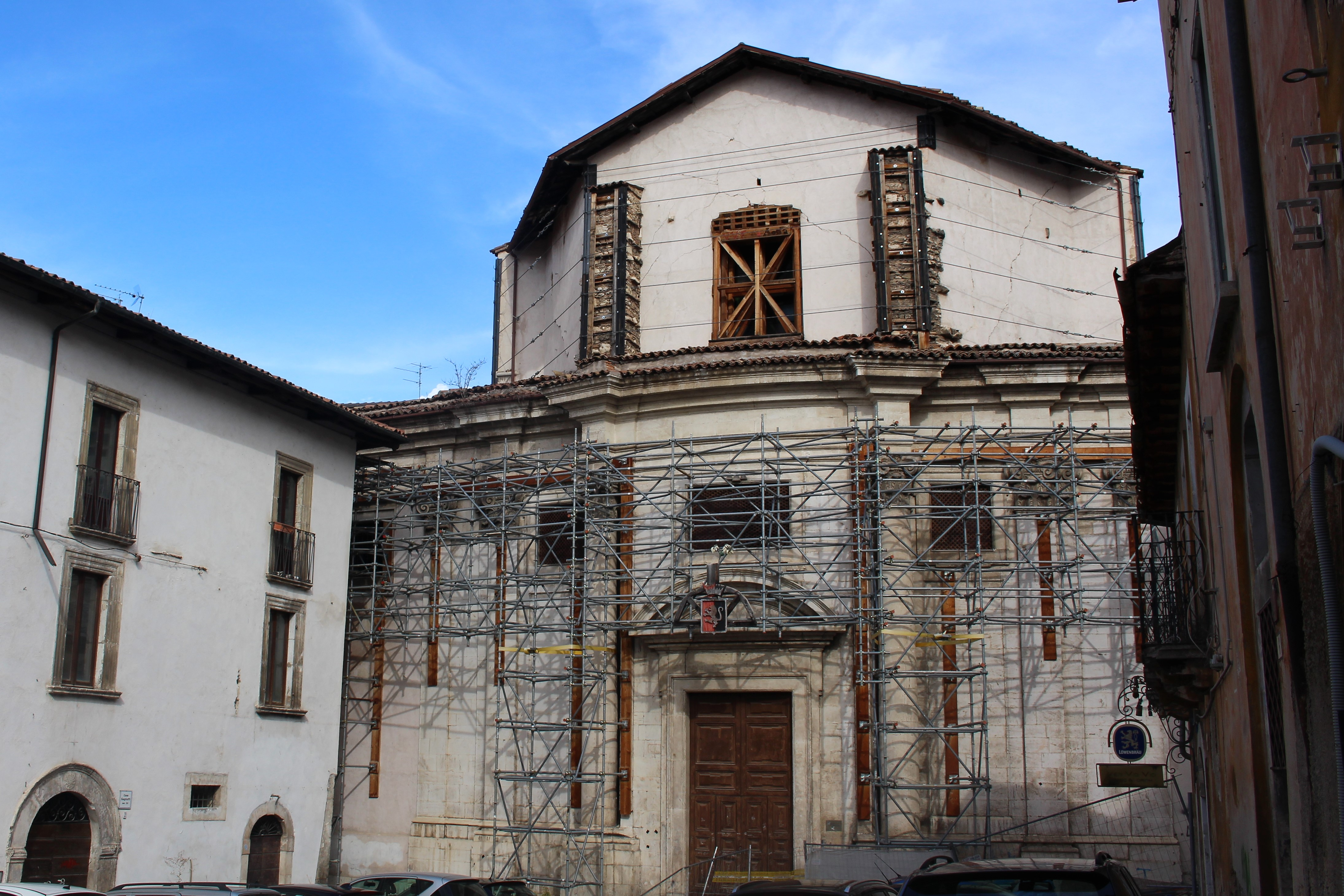 Chiesa di Santa Caterina martire dopo il terremoto dell'Aquila del 2009.